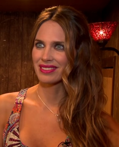 Vanesa Romero